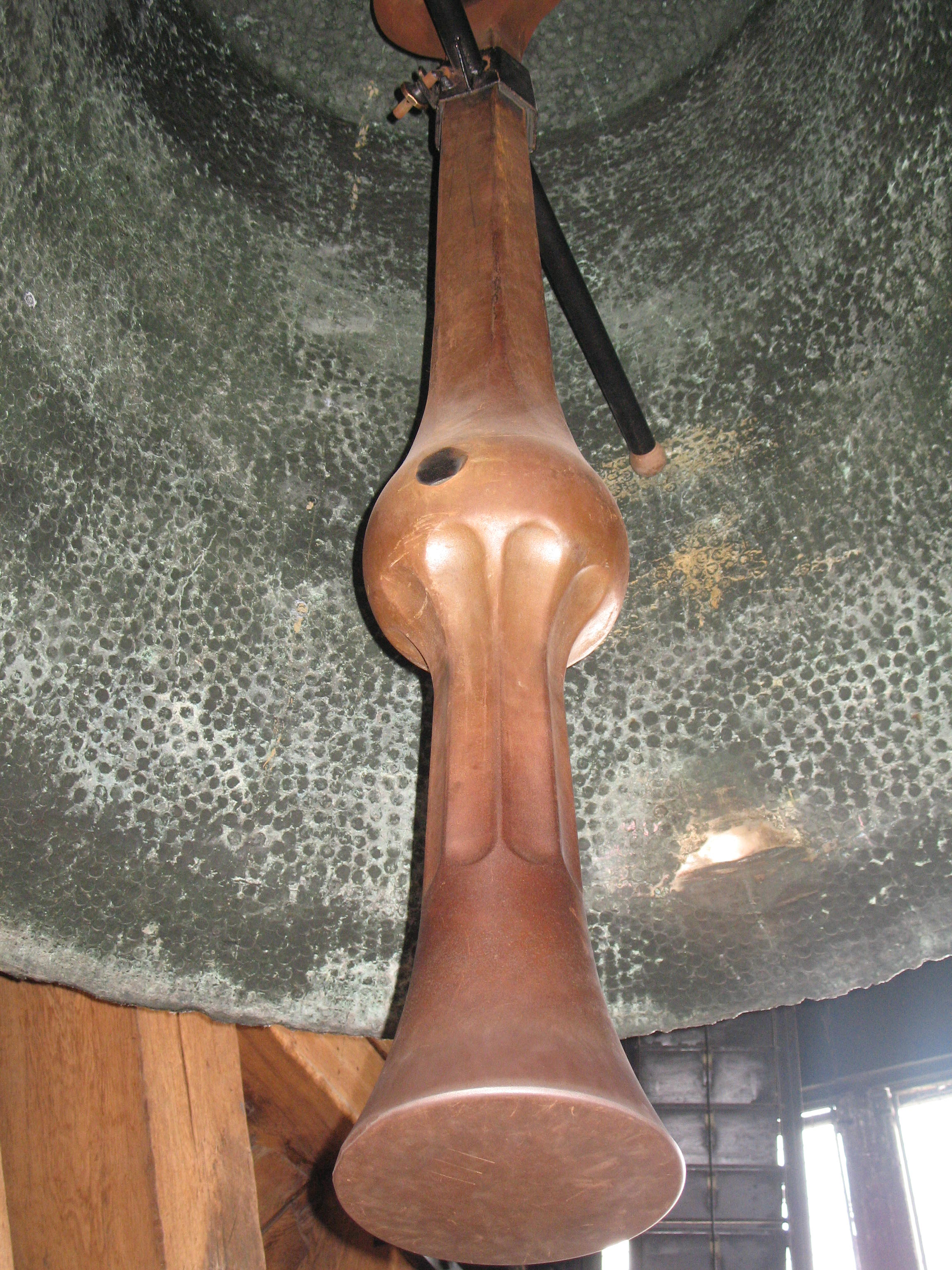 Wawel in Kraków, Poland